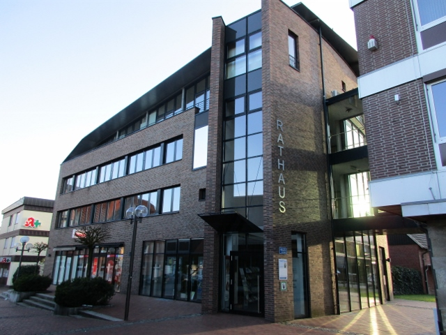 Das Rathaus in Heiden